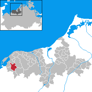 Neubukow in Mecklenburg-Western Pomerania - District Bad Doberan